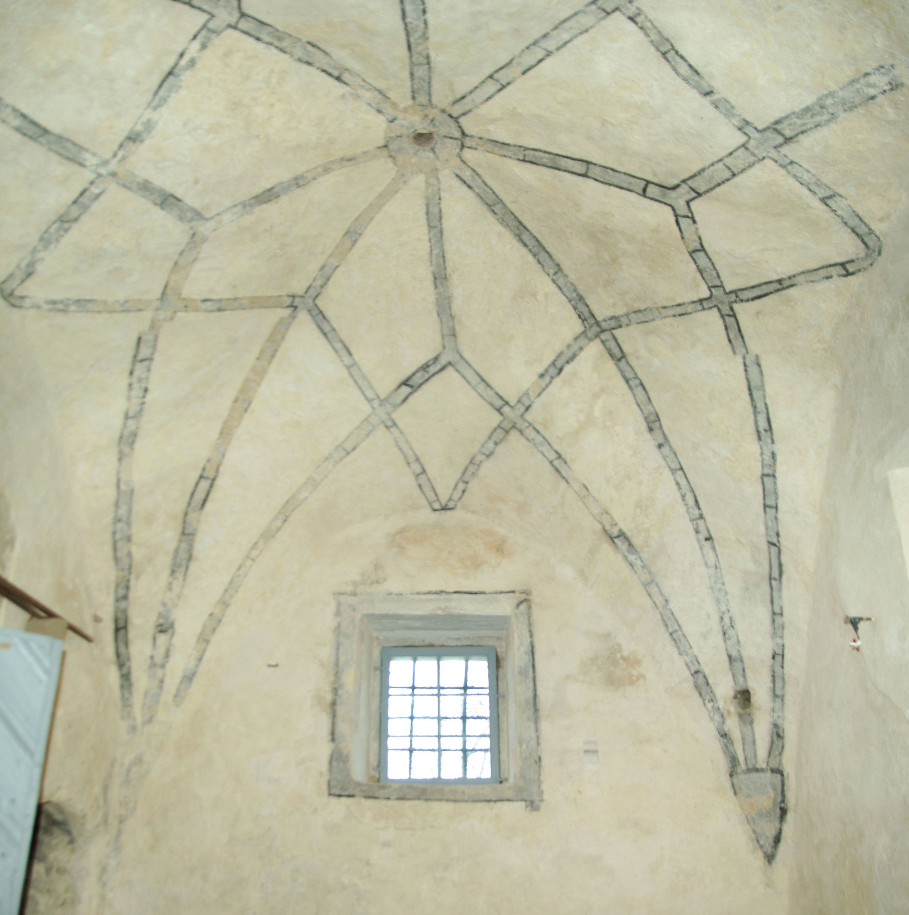 Harju-Risti kirik, 15.saj.